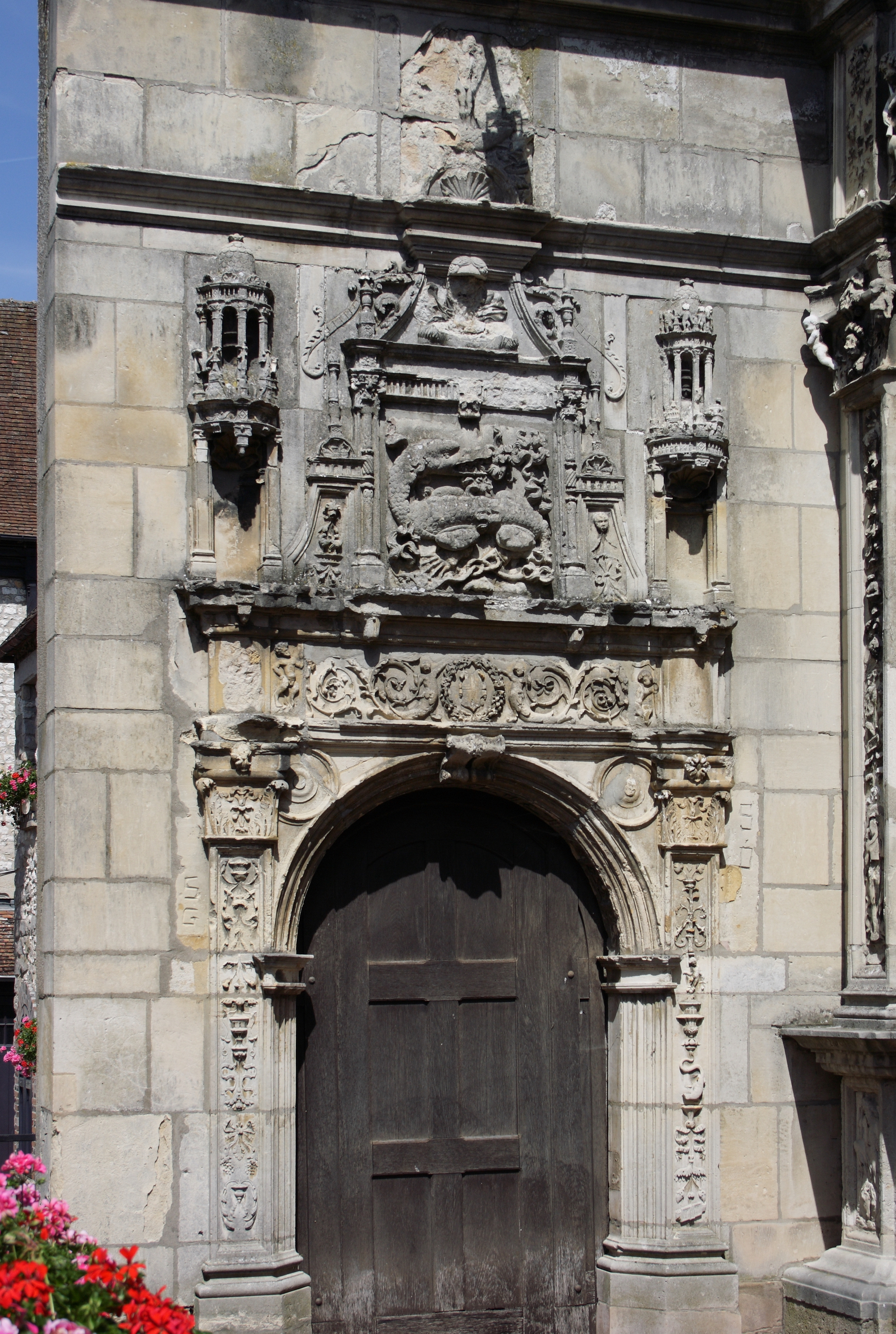 Hôtel Chabouillé in Moret-sur-Loing im Département Seine-et-Marne in der Region Île-de-France (Frankreich), Renaissanceportal mit dem Relief eines Salamanders (Emblem von François Ier)